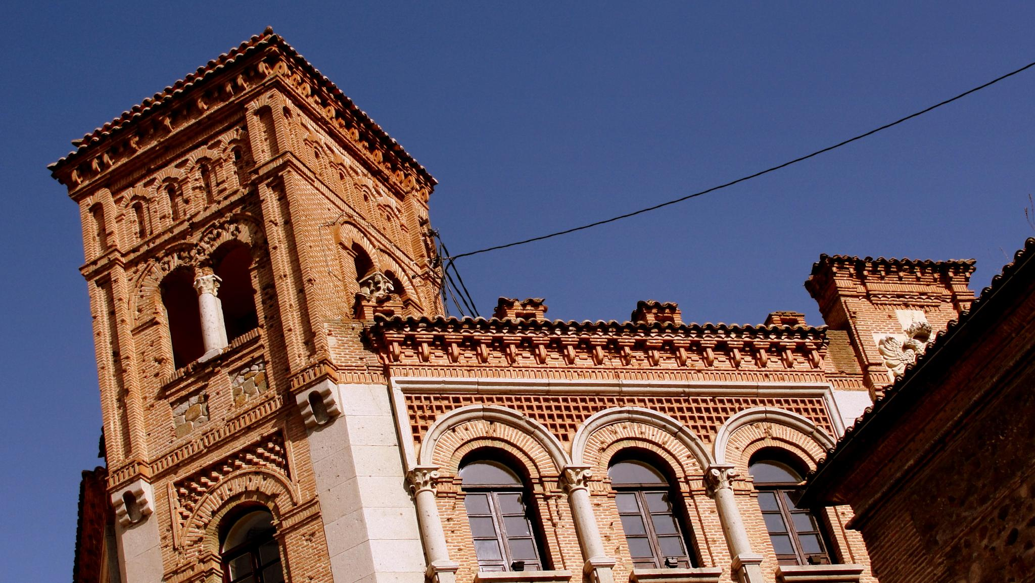 Parte superior del antiguo Casino de Toledo, España.